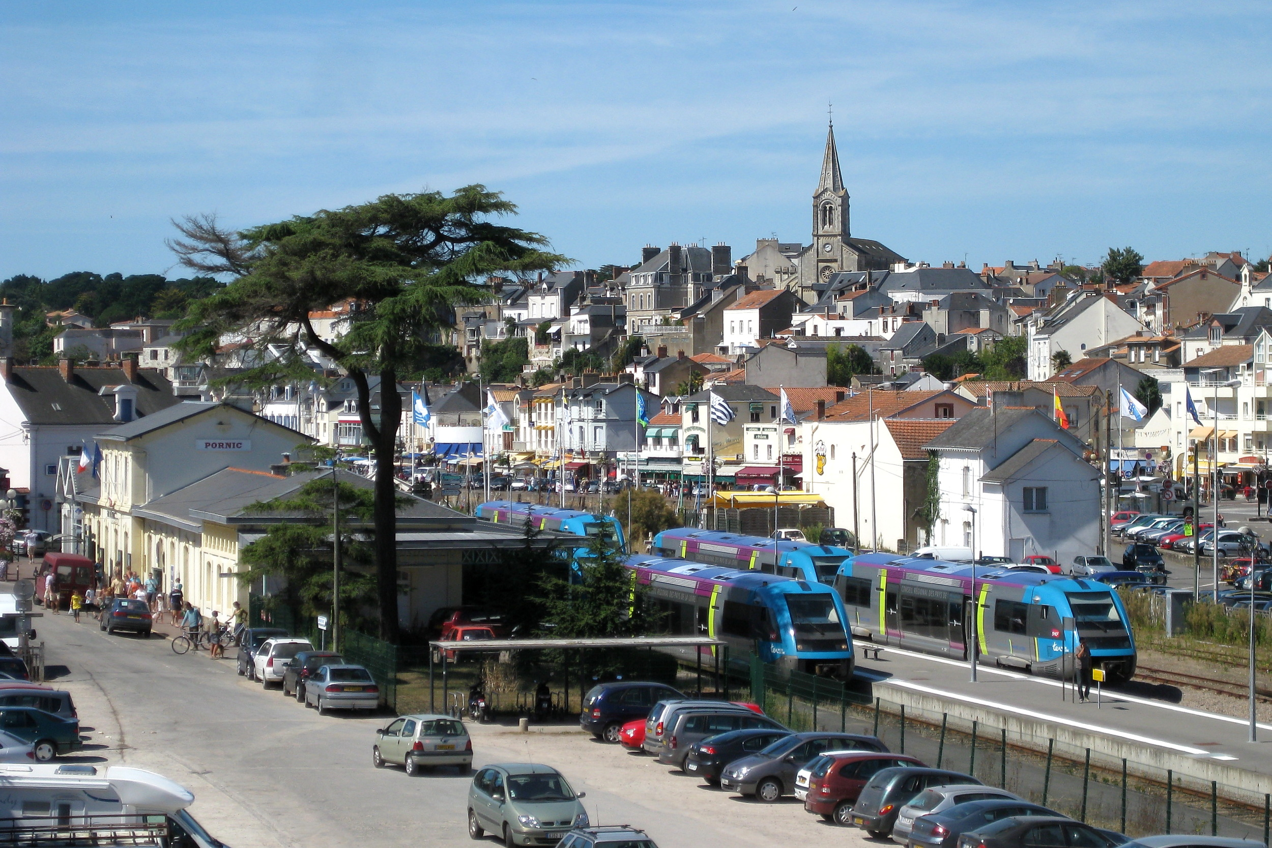 Vue générale de la gare de Pornic, avec plusieurs X73500 garés